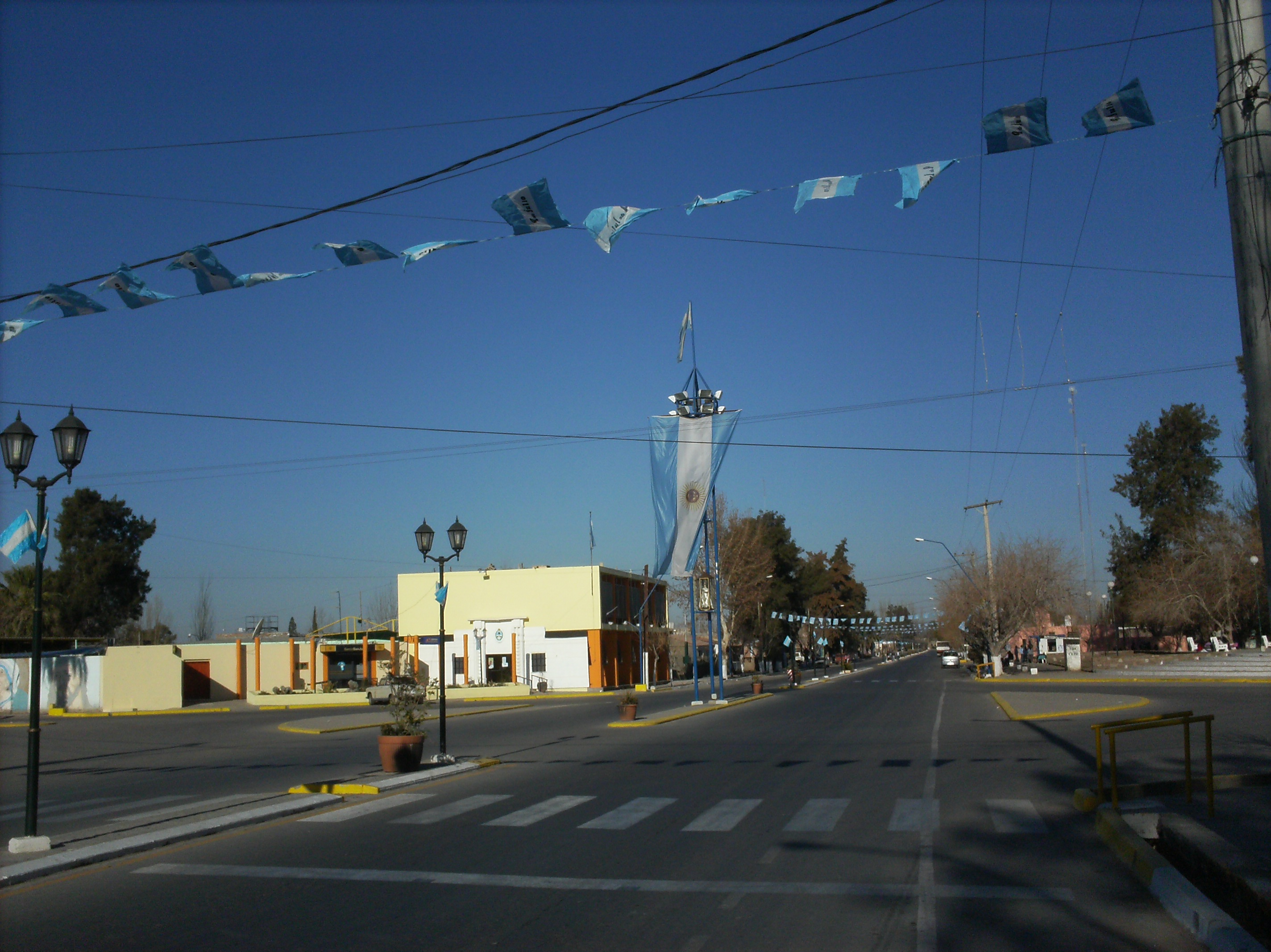 la entrada a la villa 9 de julio, de fondo su municipalidad